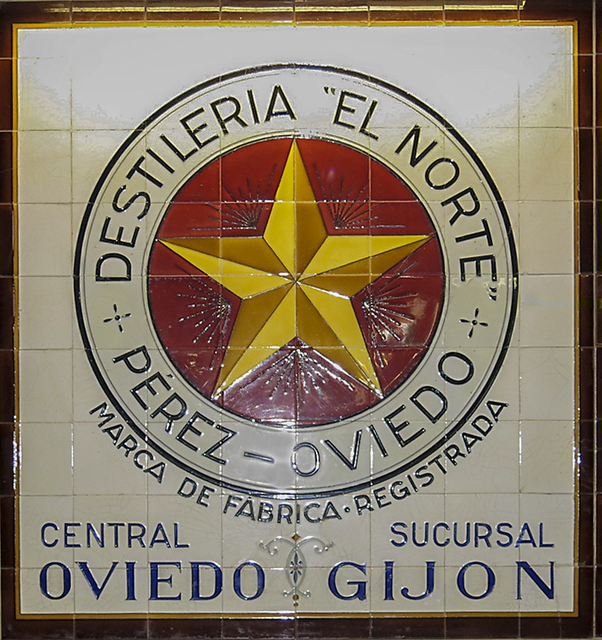 Projecte de col·laboració de l'Arxiu Ismael Latorre Mendoza amb Wikimedia Commons i Amical Wikimedia.